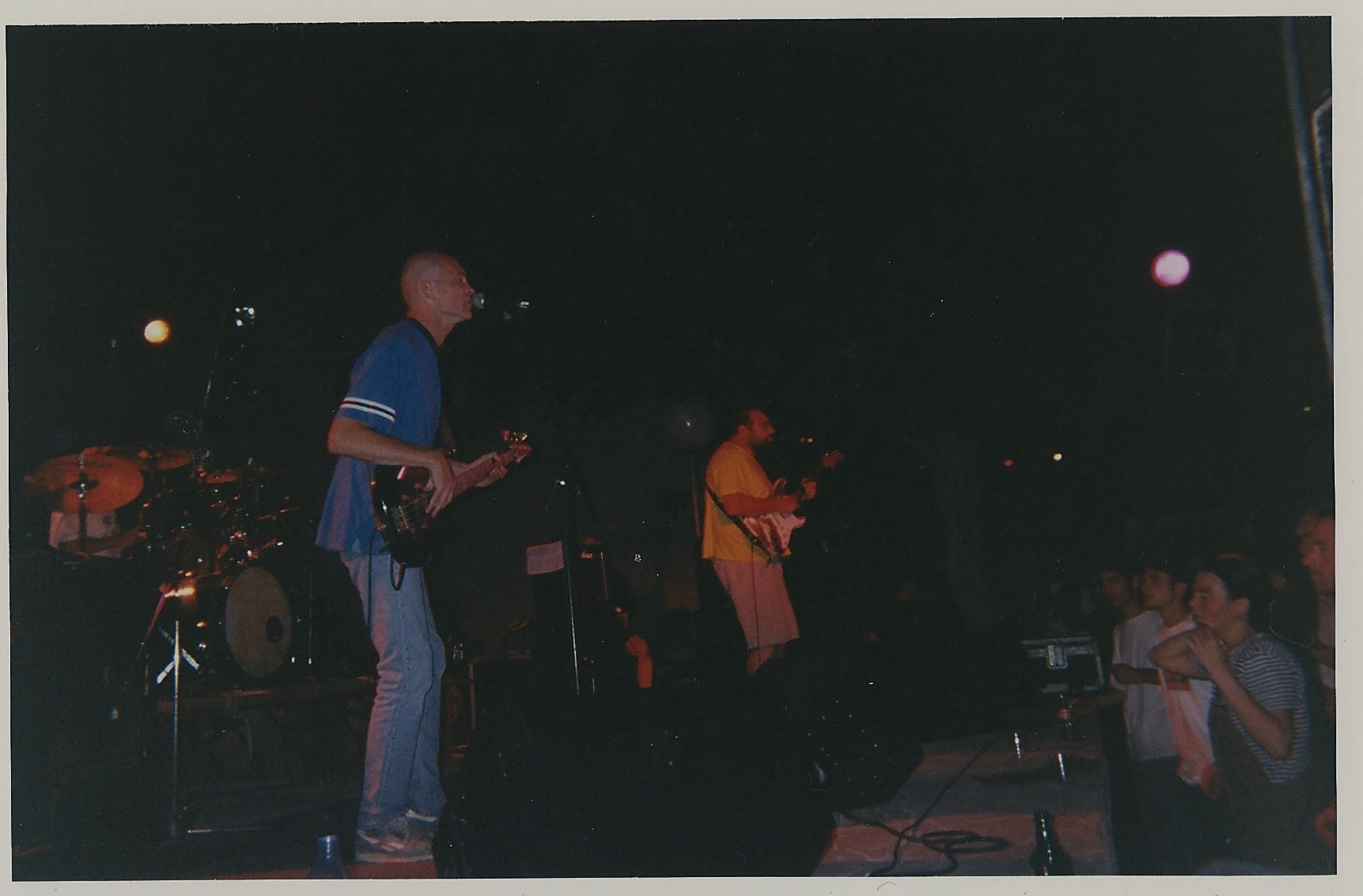 Marc Dechaumont et Nicolas Cassagneau en concert dans l'Aude (été 1998).